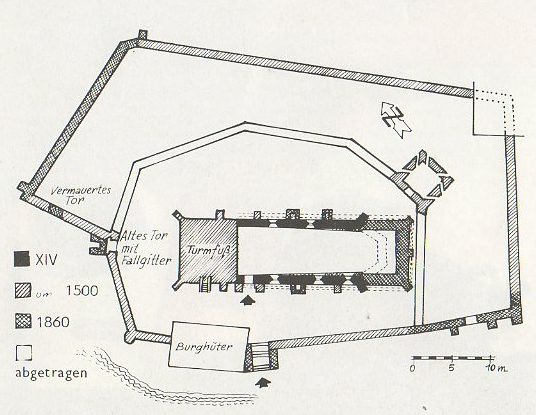 Planul fortificatiei din Stejarisu.